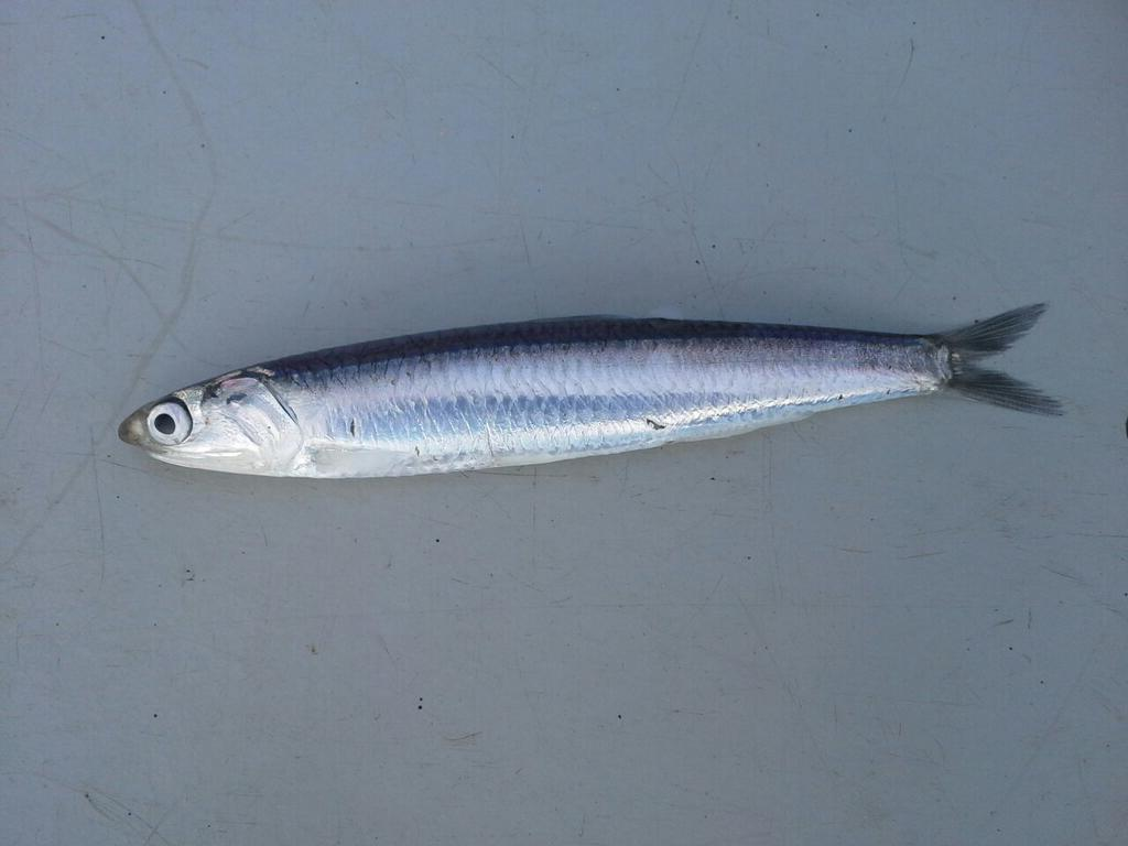 Ansjovis (ondersteboven)